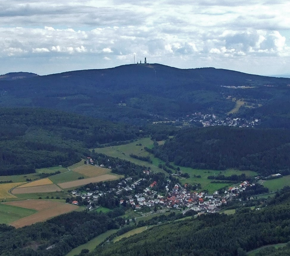 Hochtaunus mit Feldberggipfel, Luftaufnahme vom Hintertaunus (Ausschnitt)